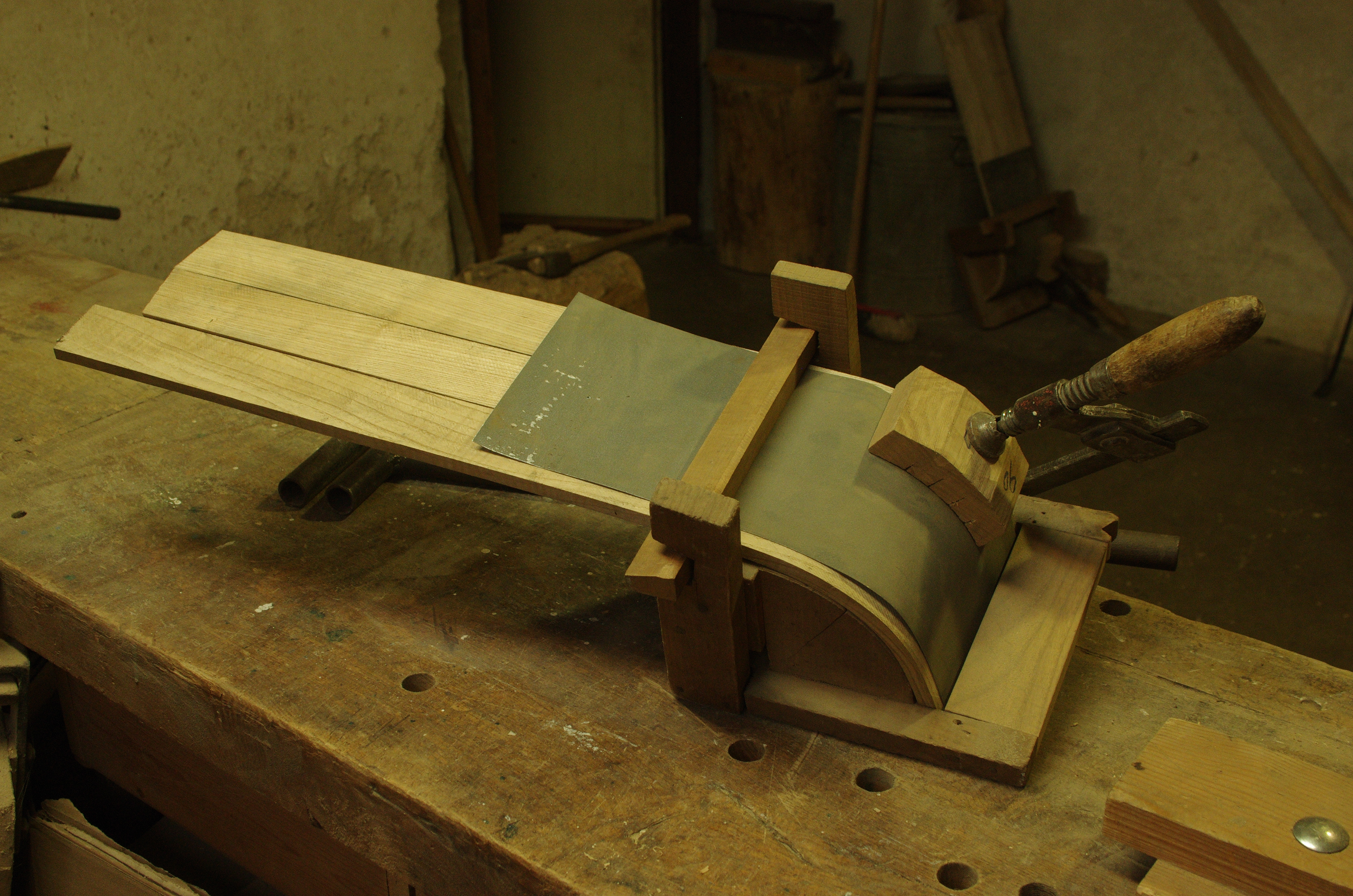 Dřevěné lišty saní ohnuté a zafixované na šabloně